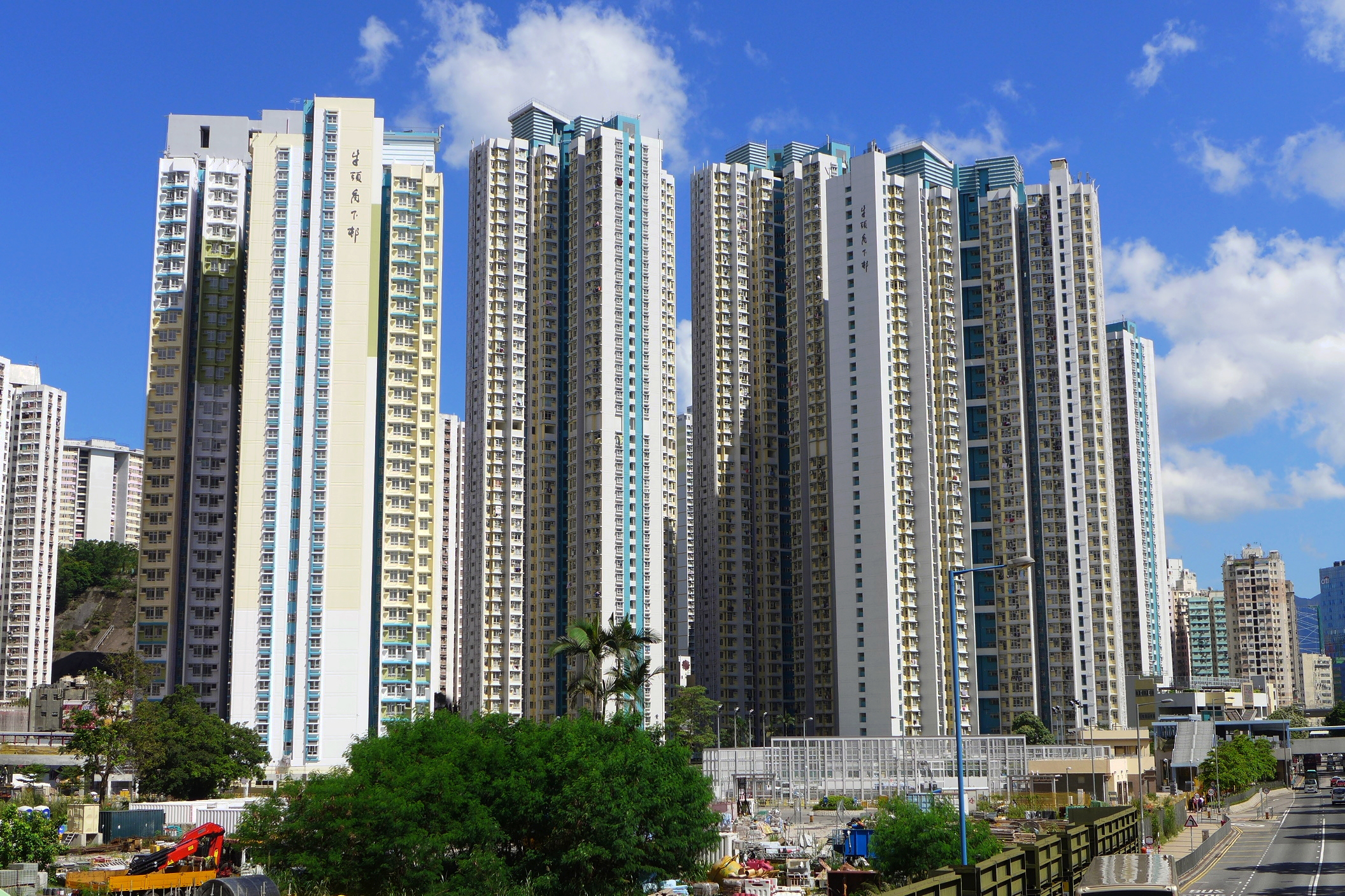 Lower Ngau Tau Kok Estate